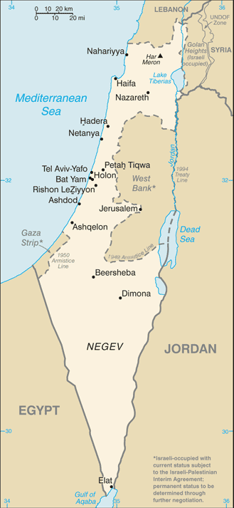 2004 version